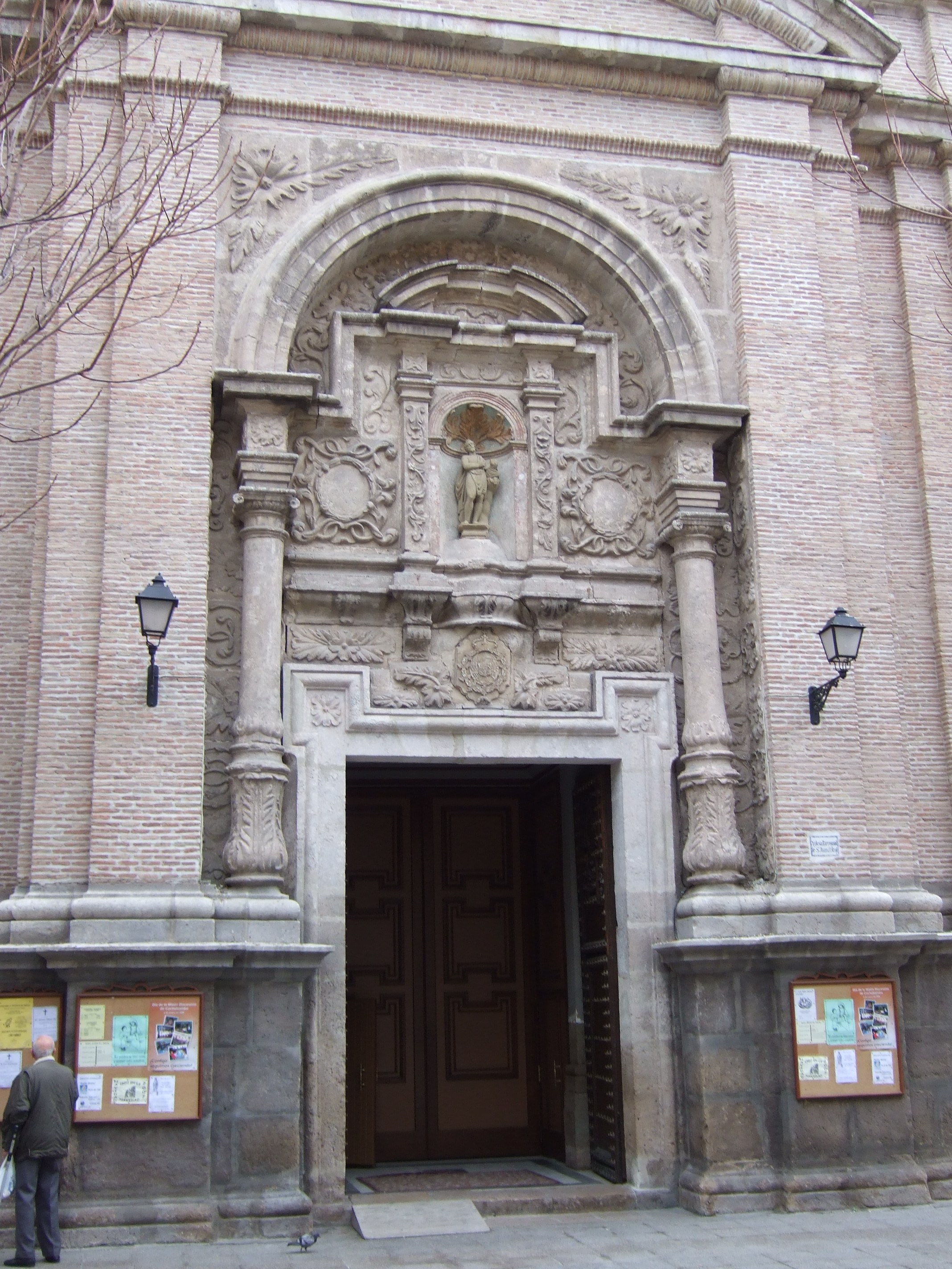 Calatayud - San Juan el Real - Portada principal barroca.